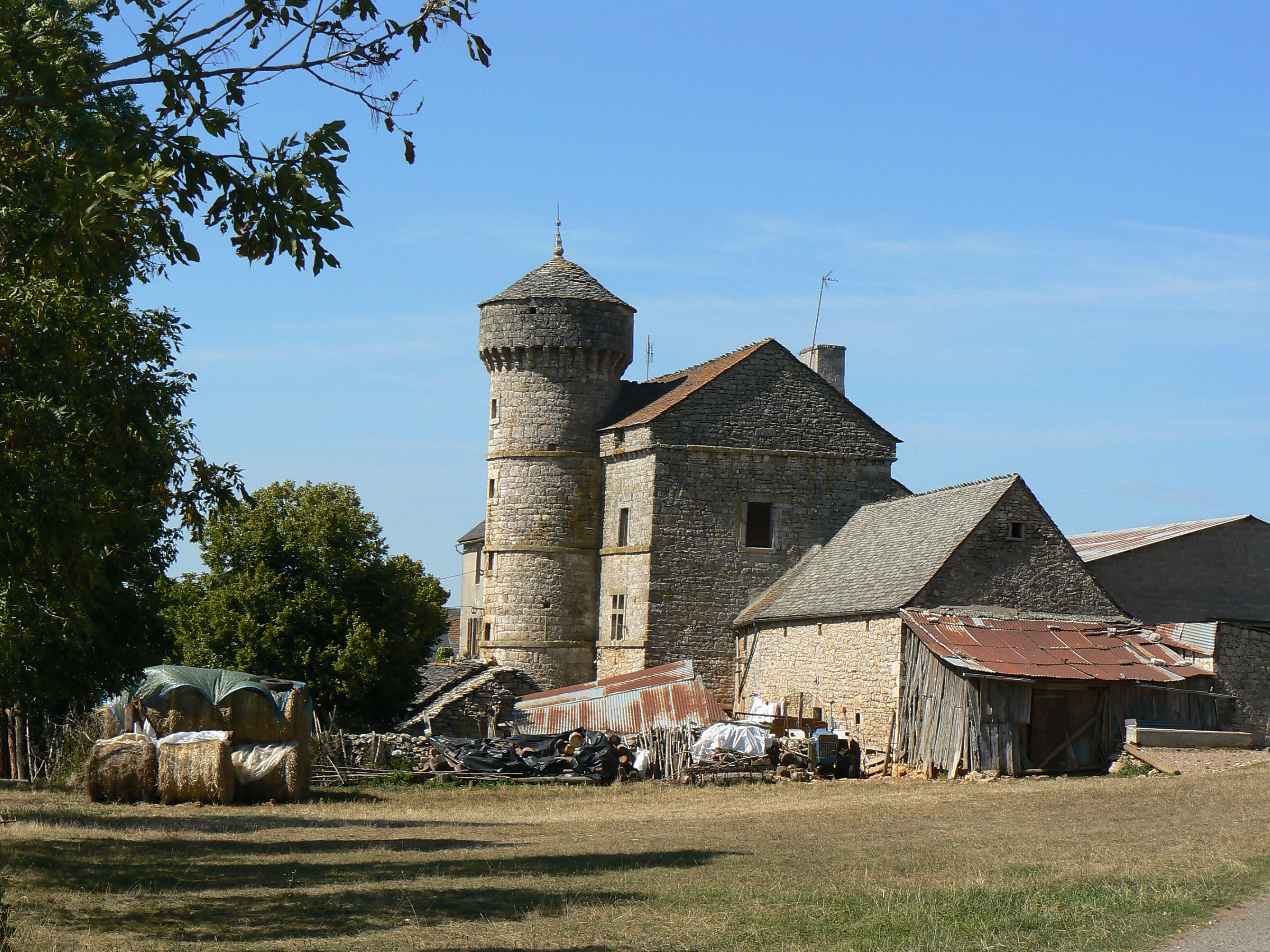 Ferme fortifiée du Choizal (commune de Balsièges) sur le causse de Sauveterre en Lozère (France)